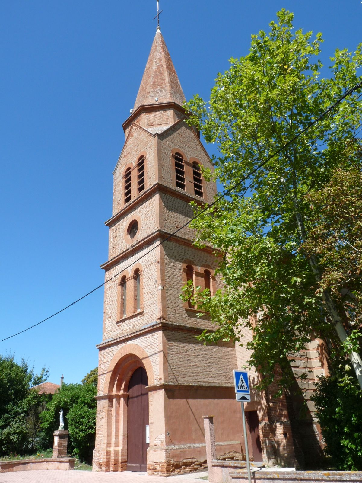 Eglise de Labruyère-Dorsa, Haute-Garonne, France